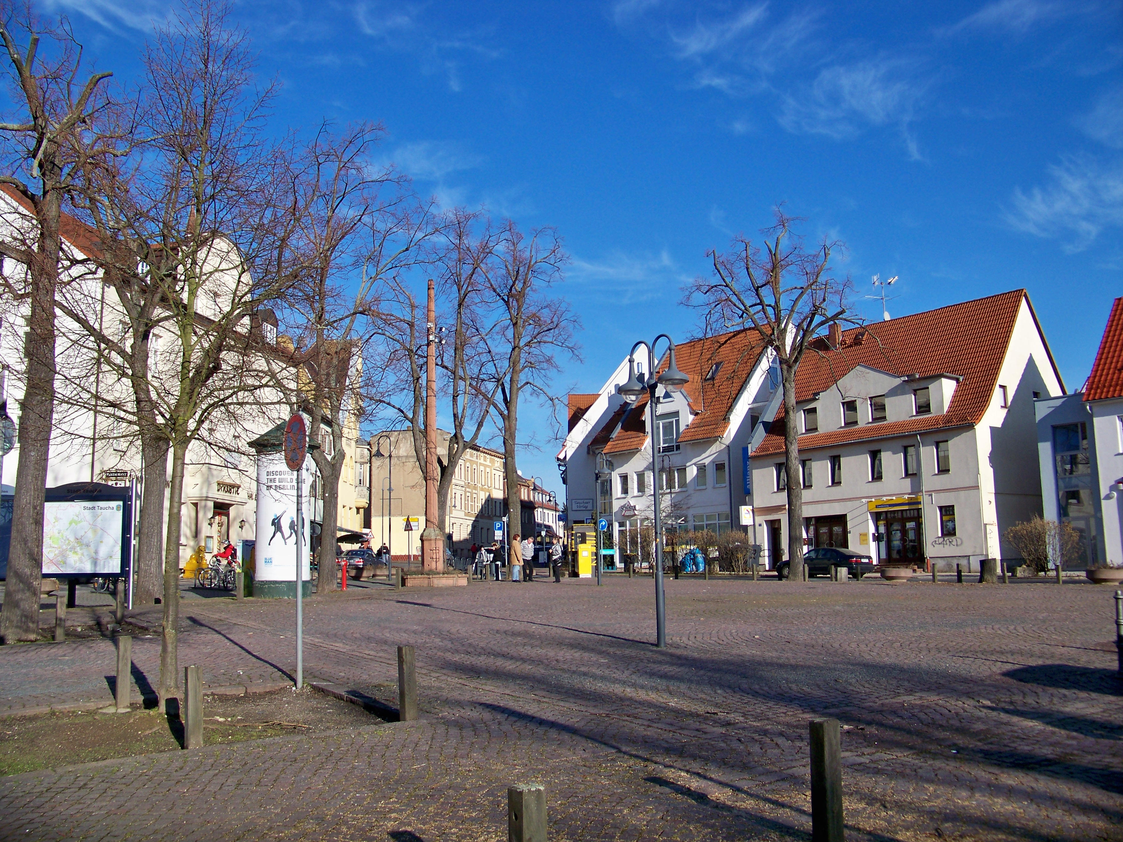 Marktplatz in Taucha (bei leipzig)